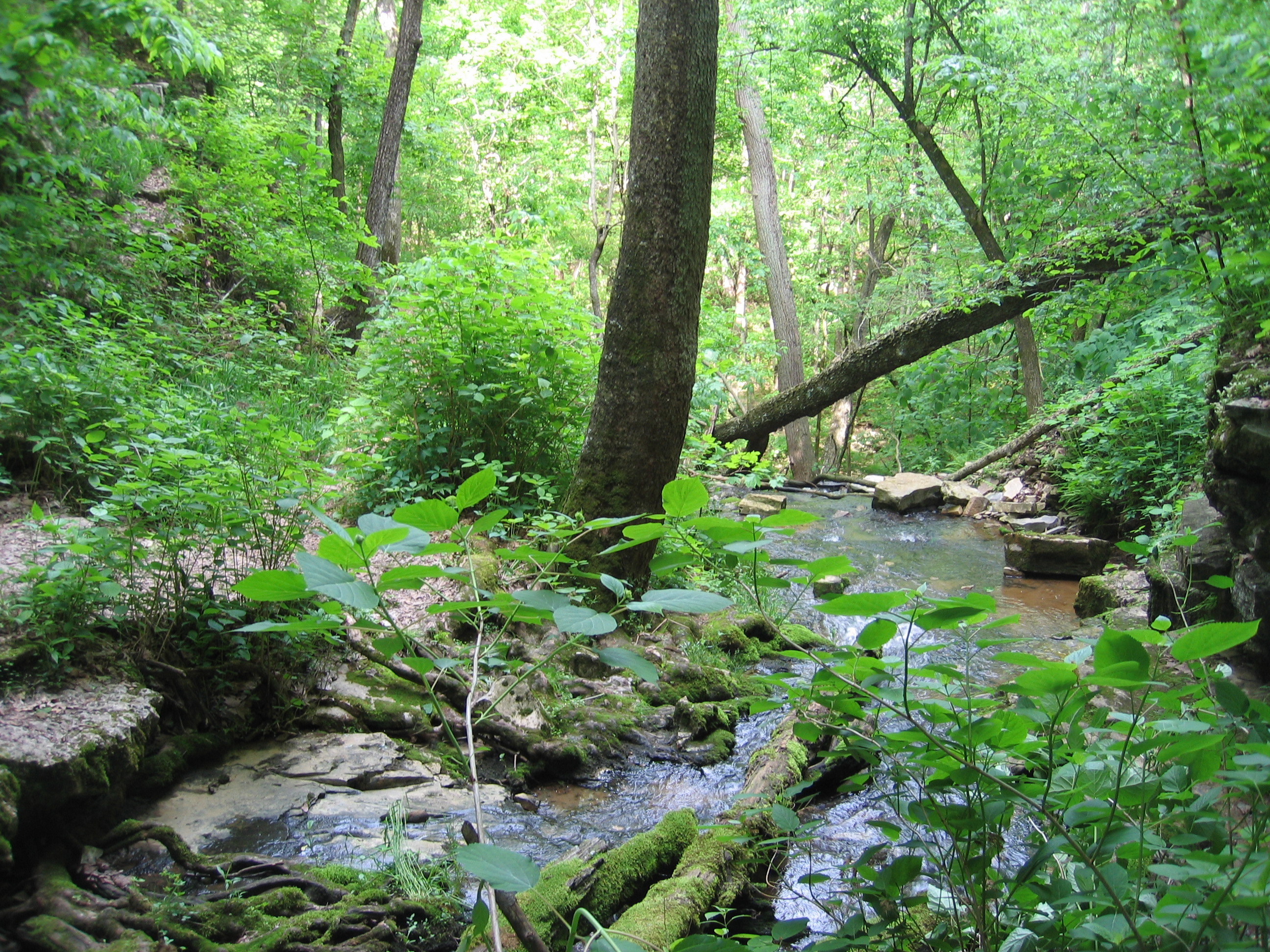 Kleiner Fluss im Otter Creek Park (Otter Creek Outdoor Recreation Area), Meade County, Kentucky, USA